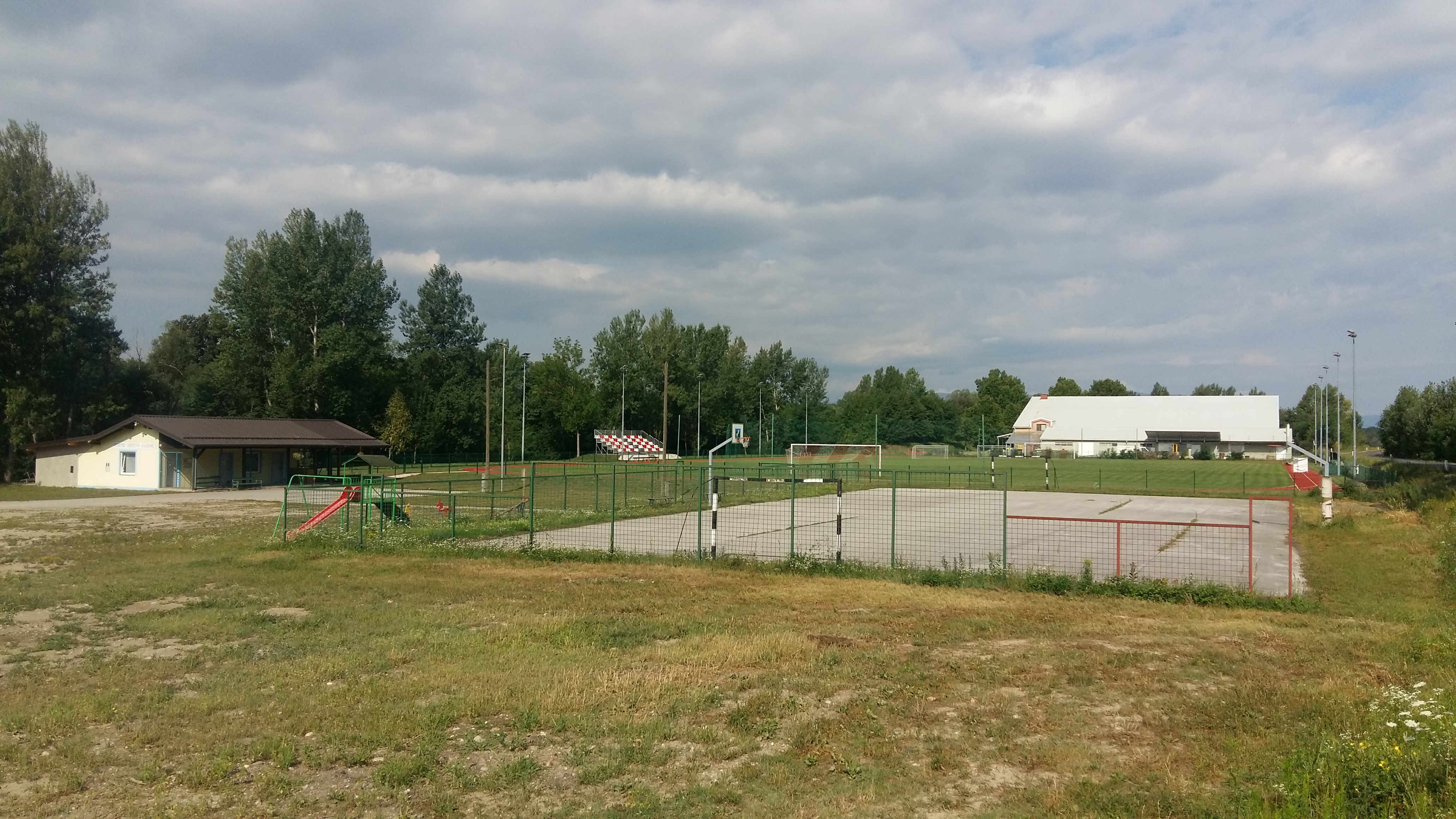 Hajdoše